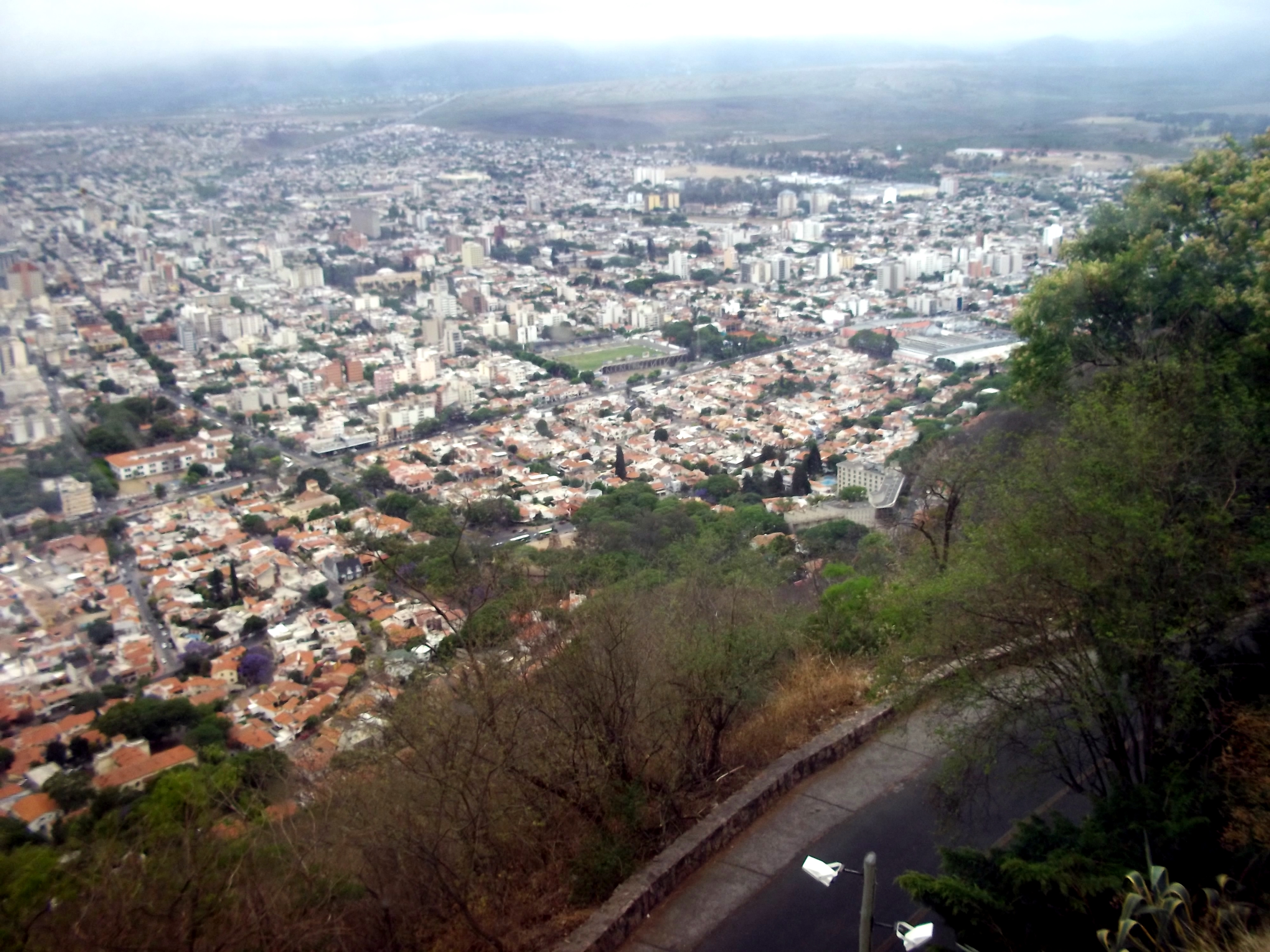 Imagen panorámica de la Ciudad de Salta desde el Cerro San Bernardo.